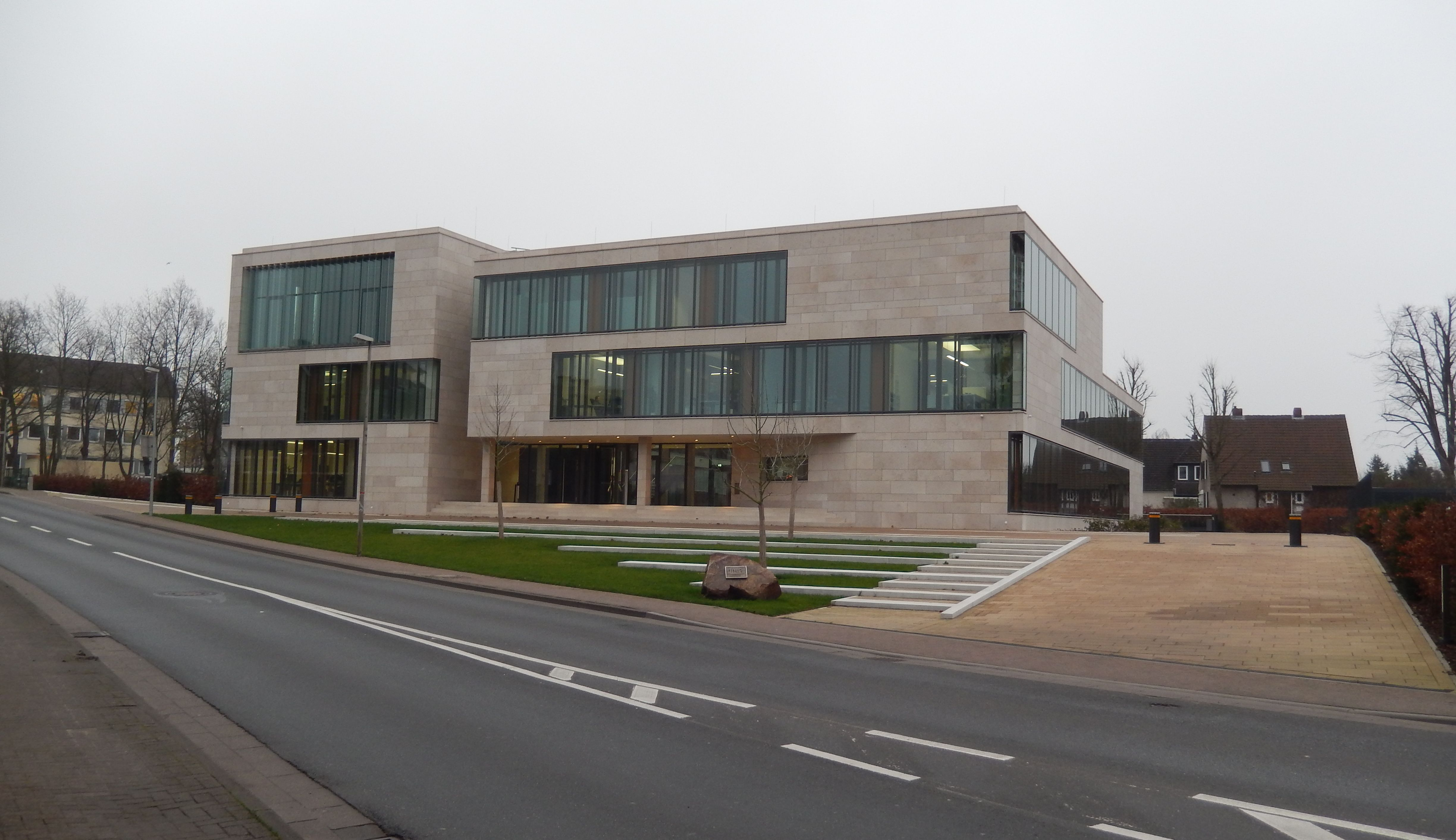 Hauptsitz der Firma IKN in Neustadt am Rübenberge